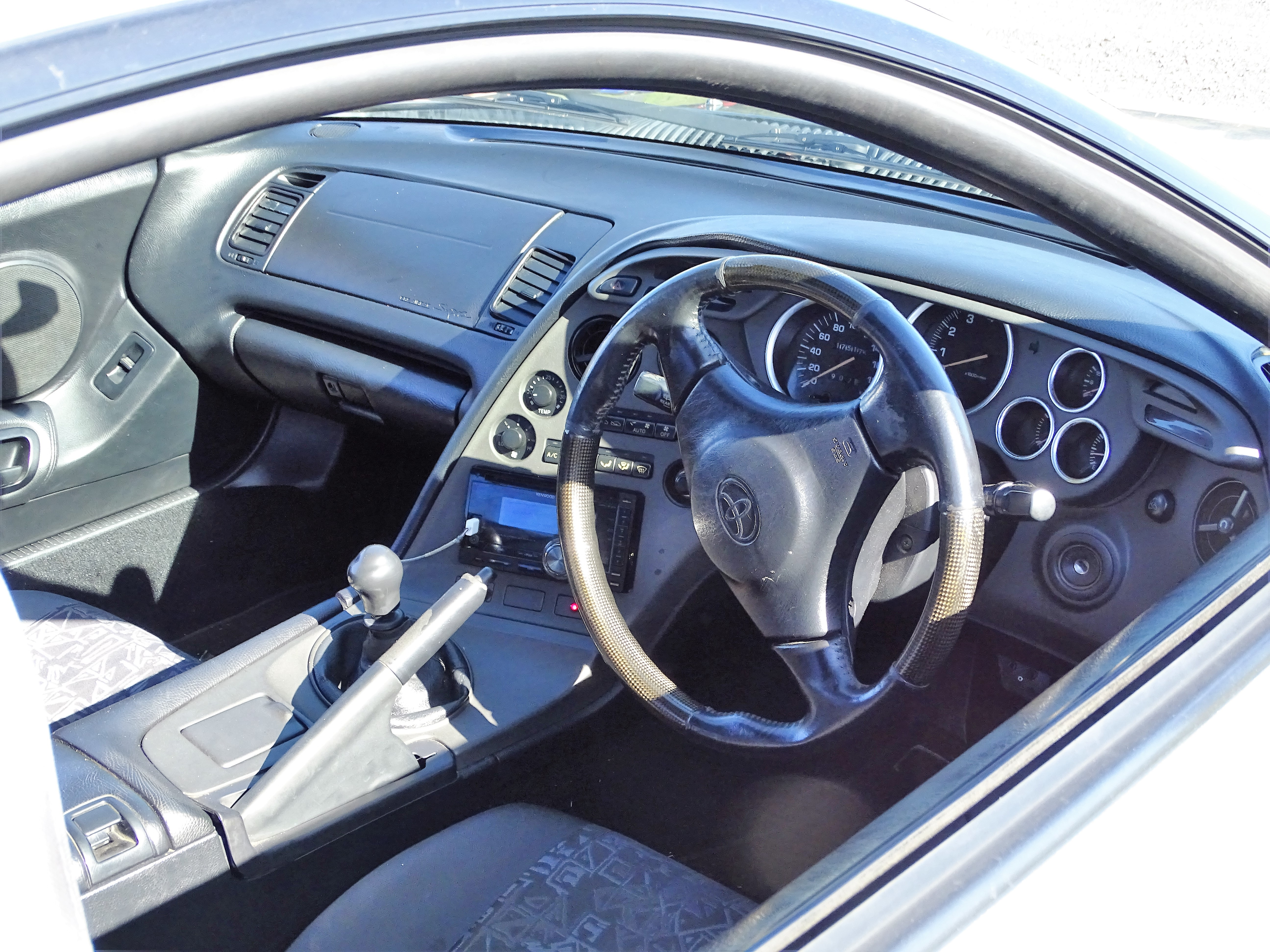 Toyota Supra